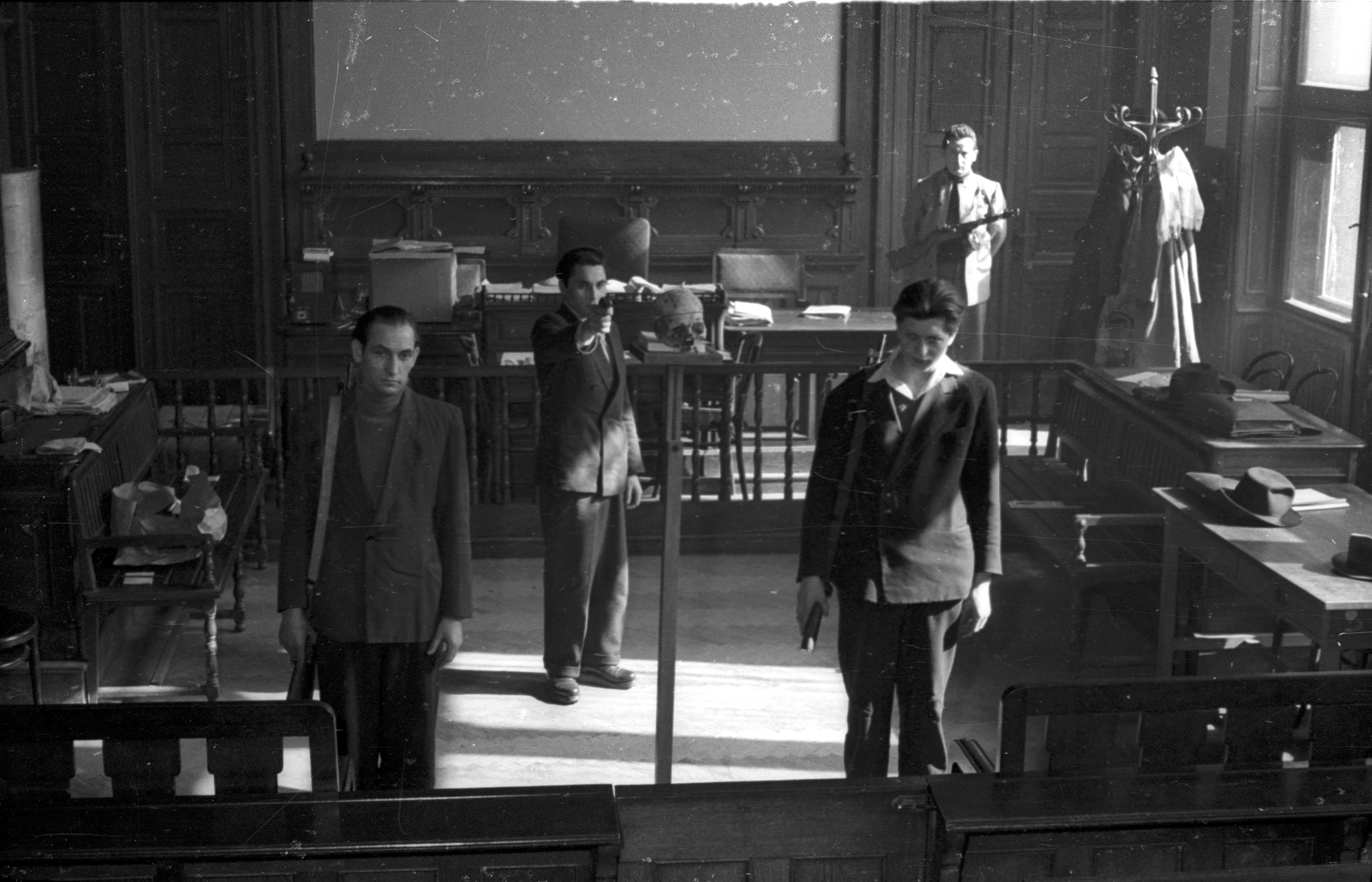 1956-utóélet / bírósági tárgyalás / fegyver Location: Hungary Tags: weapon, pistol, trial Title:Bírósági tárgyalás, Budapest 1958 - Fortepan 103982.jpg